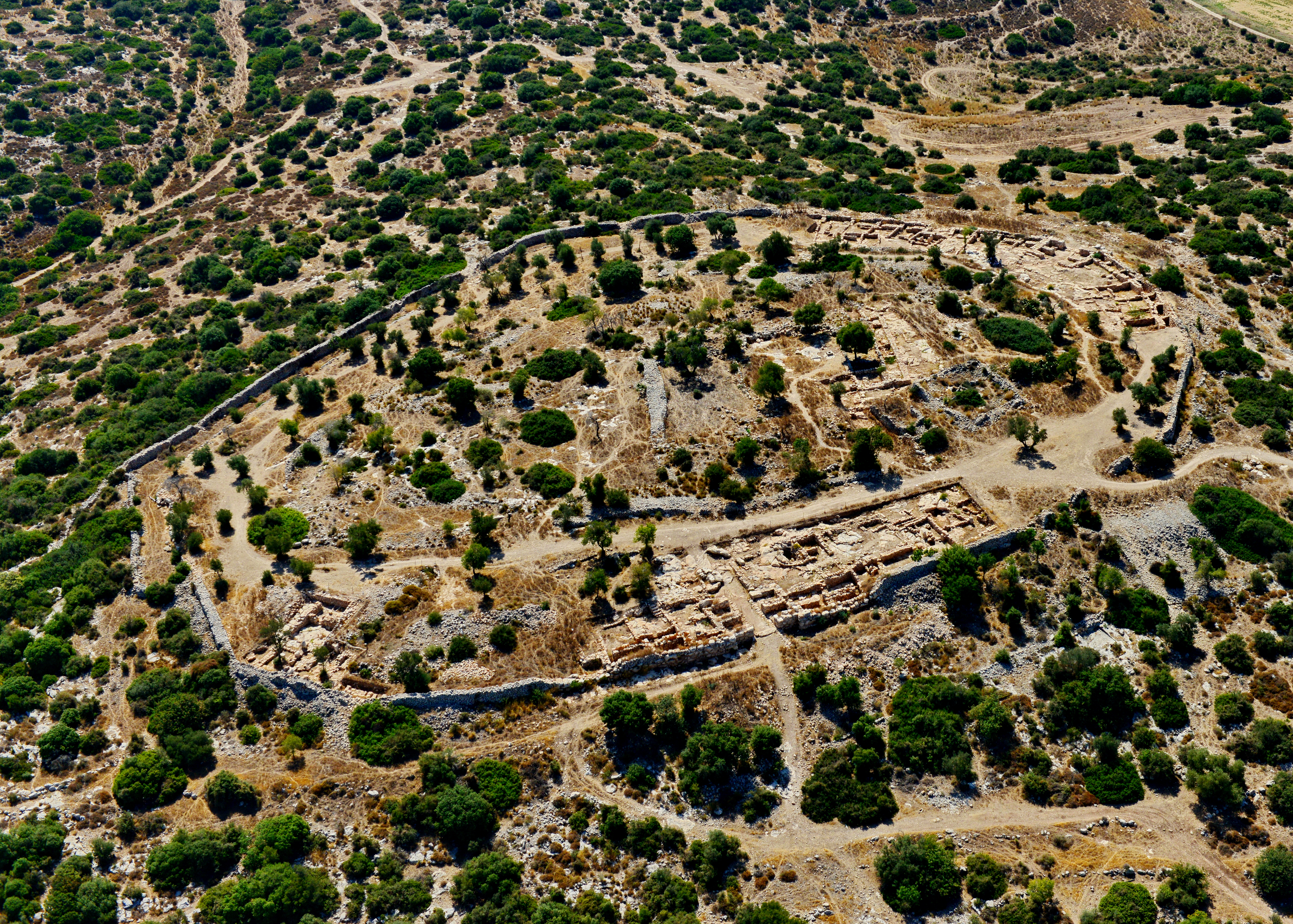 שרידי יישוב גדול, מוקף בחומה. על-פני השטח נראים שרידי מבנים ושער. גתות חצובות, בית בד, אגנים וספלולים. בור מים חצוב במרכז היישוב. ממערב נראים שרידי עיר תחתית, בה מצויים מבנים חרבים.